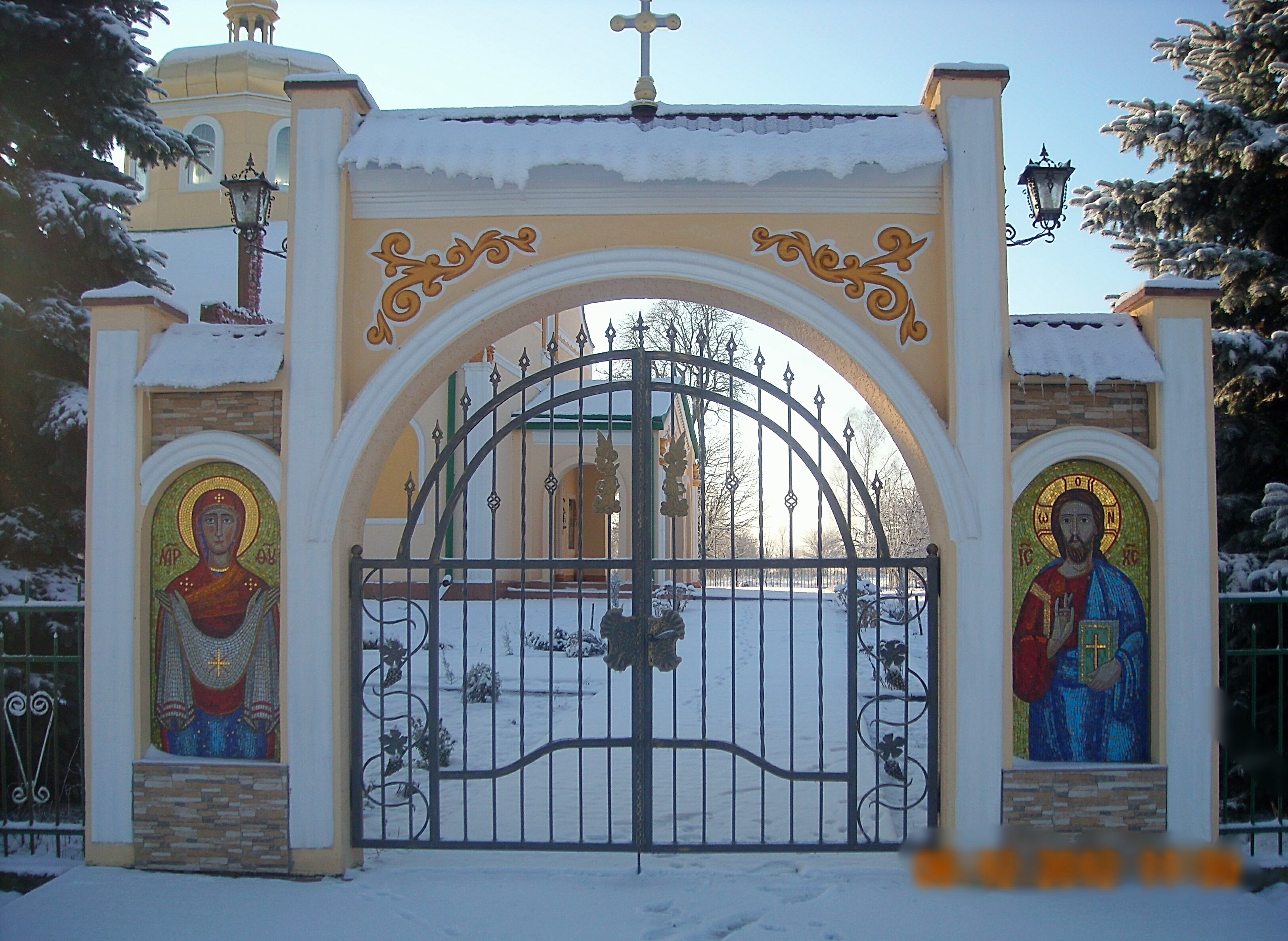 ипиа